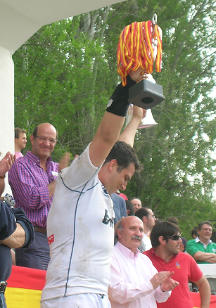 Diego Perez levantando la copa de campeón de la Copa del Rey